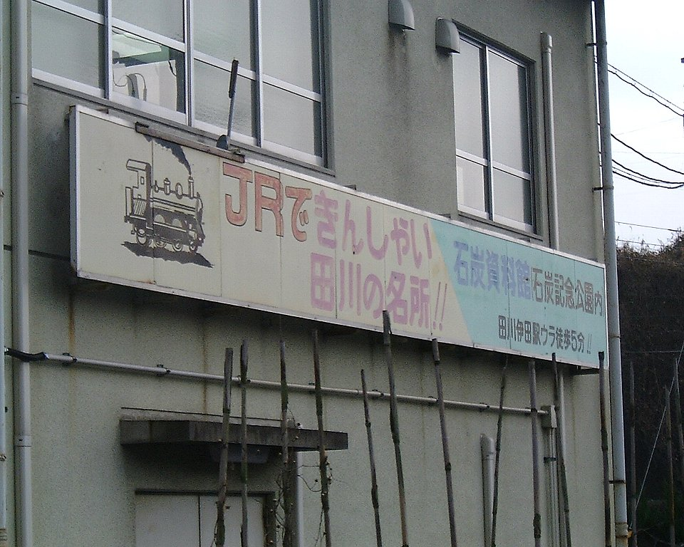 筑豊弁の一例 田川伊田駅の看板